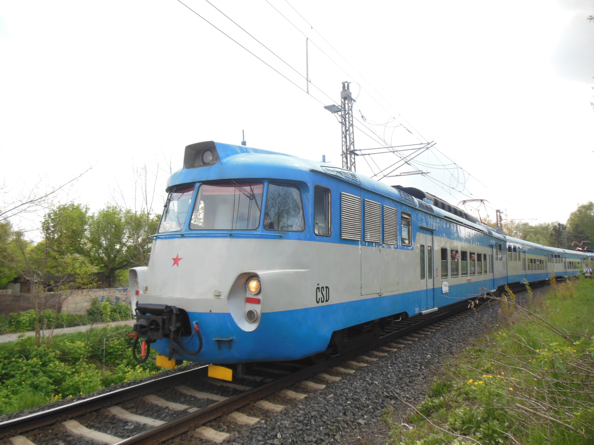 1. regionální den PID - 50 let "pantografů". Elektrická jednotka EM 475.1-045 (dnešní řada 451) přijíždí na nádraží v Milovicích (okres Nymburk).